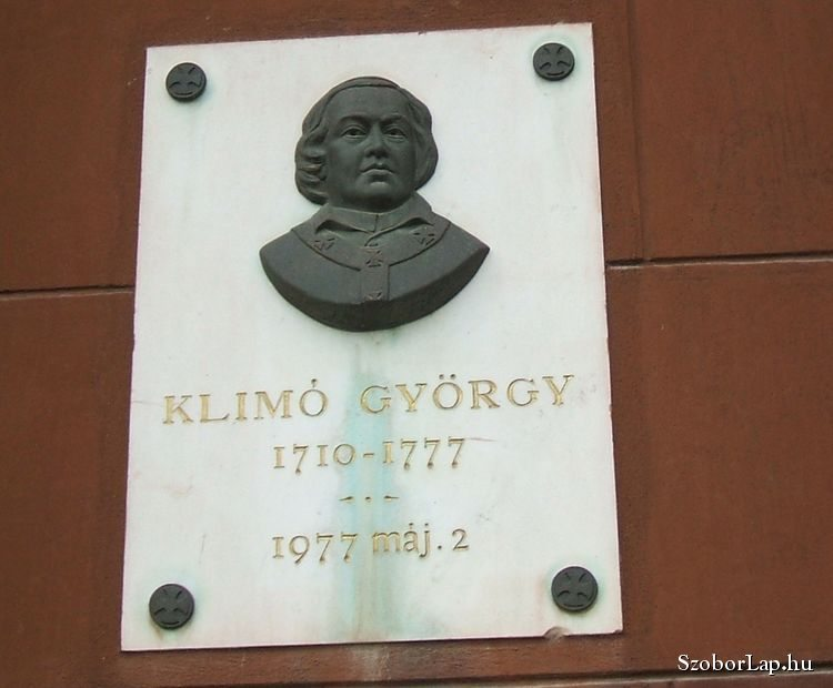 Klimó György, egykori pécsi püspöknek állított emléktábla a pécsi Szent István téren